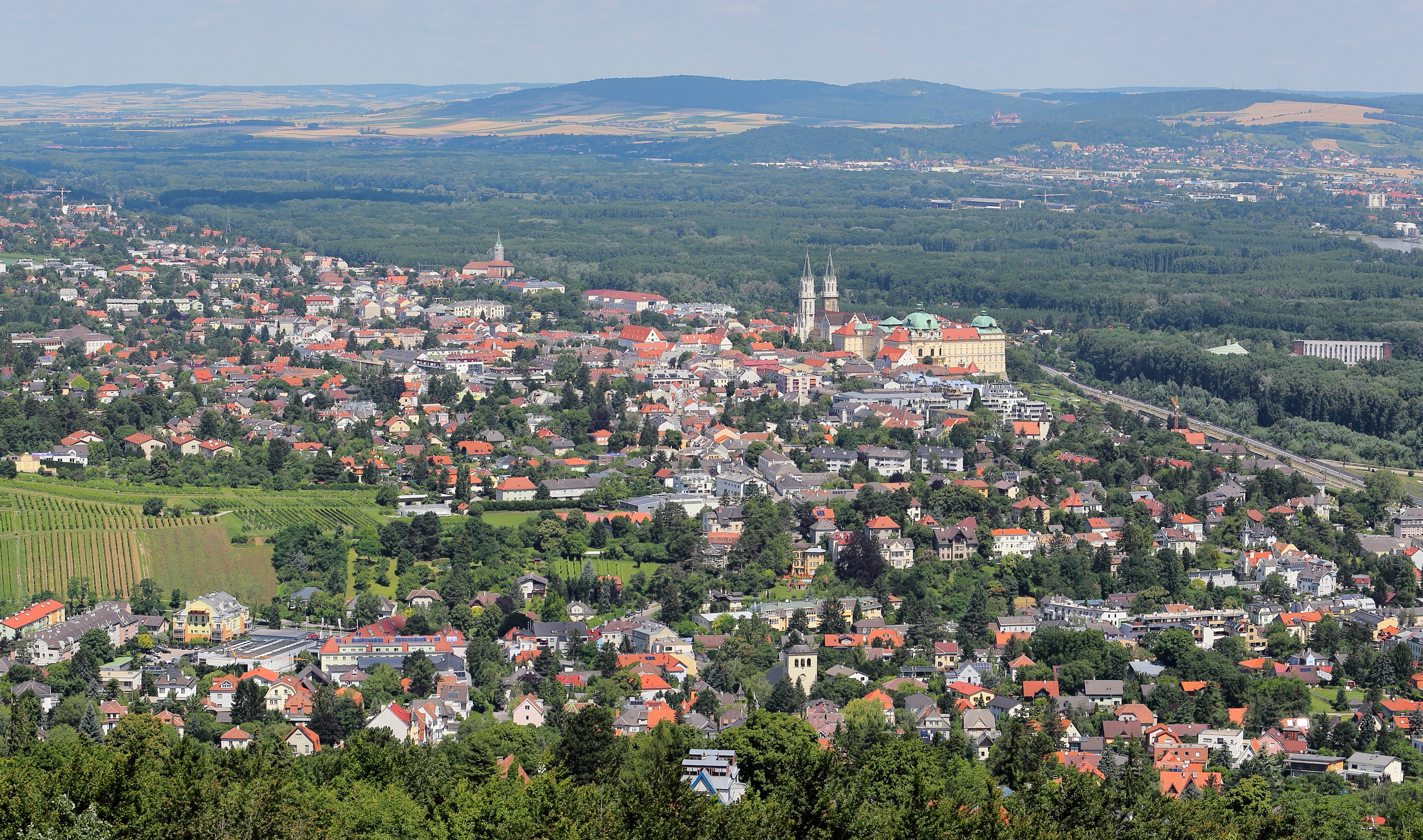 Südansicht der niederösterreichischen Stadt Klosterneuburg.